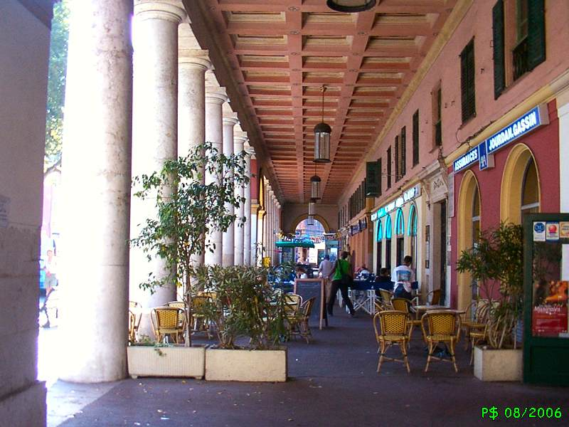 Les arcades de la place Ile de Beauté abritent à présent des cafés du coté de la rue Cassini.